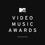 Logotipo de los premios MTV Video Music Awards 2014.